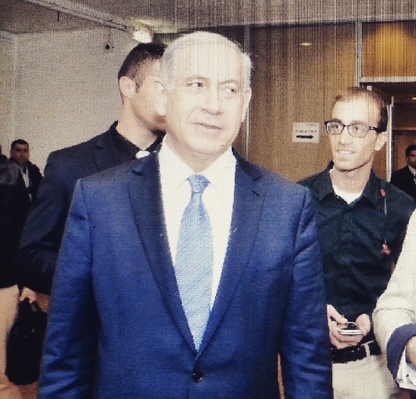 נחי וייס לצד ראש הממשלה בנימין נתניהו. 2017